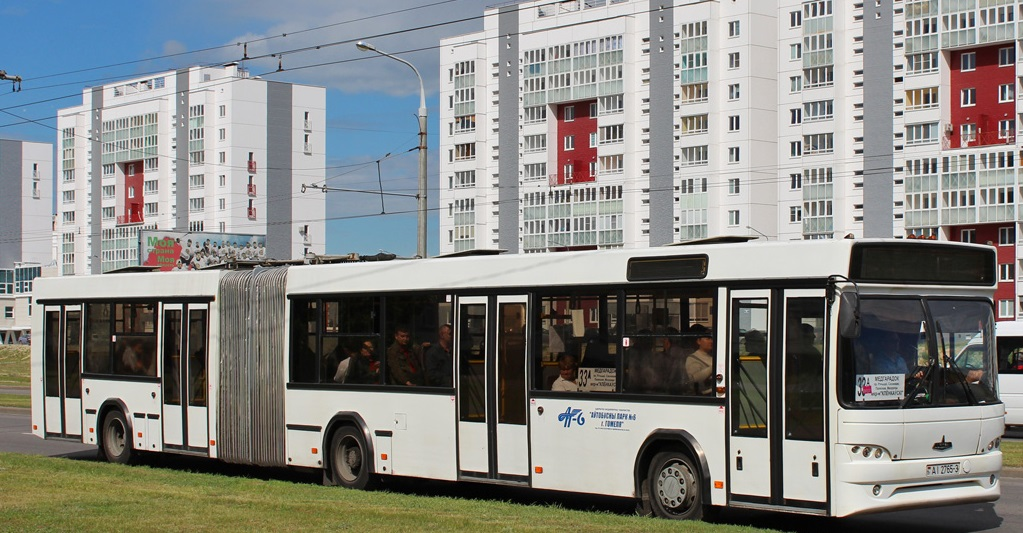 МАЗ-105 в Гомеле